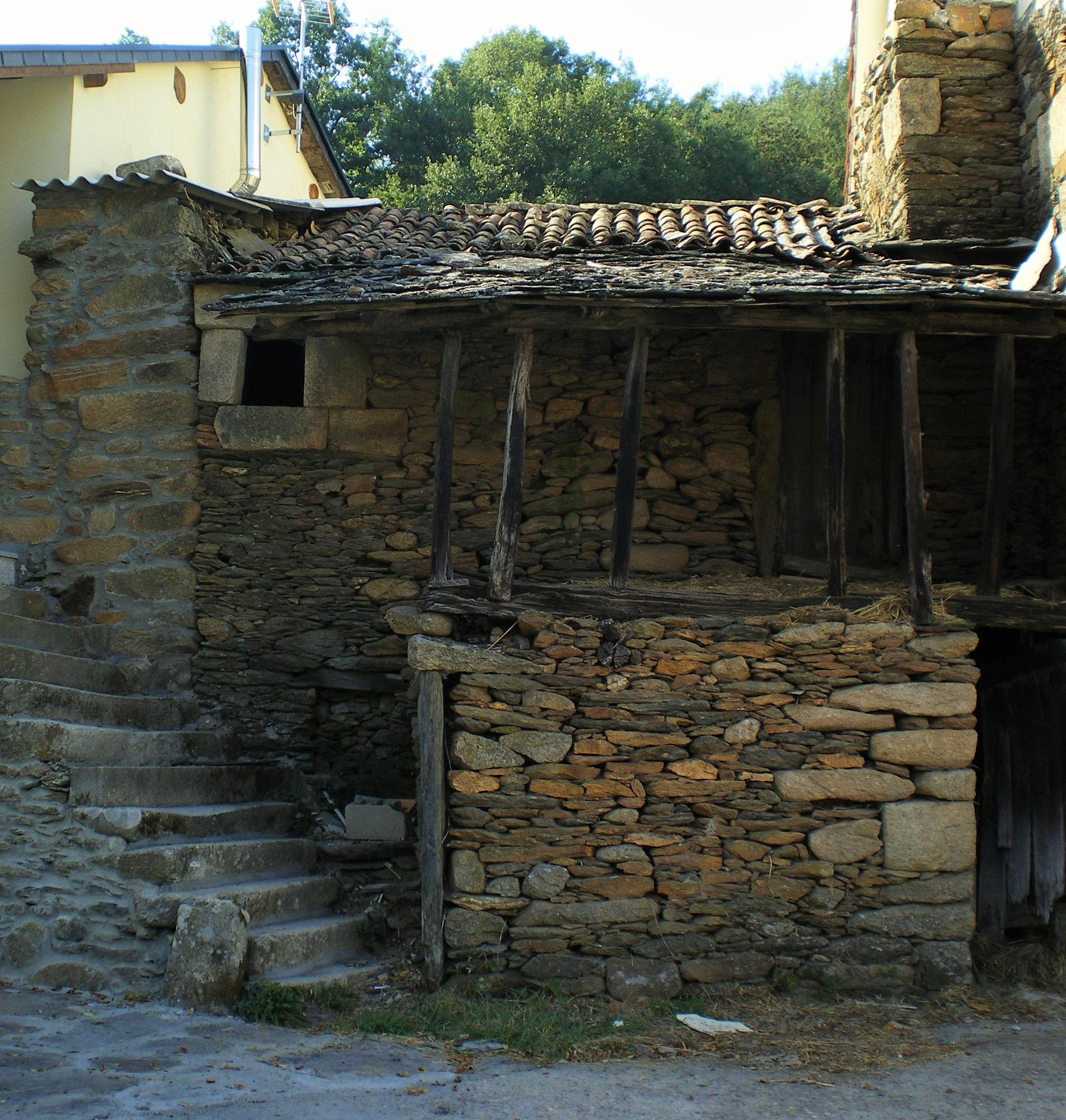 Soutelo Verde - Casa antigua conservada